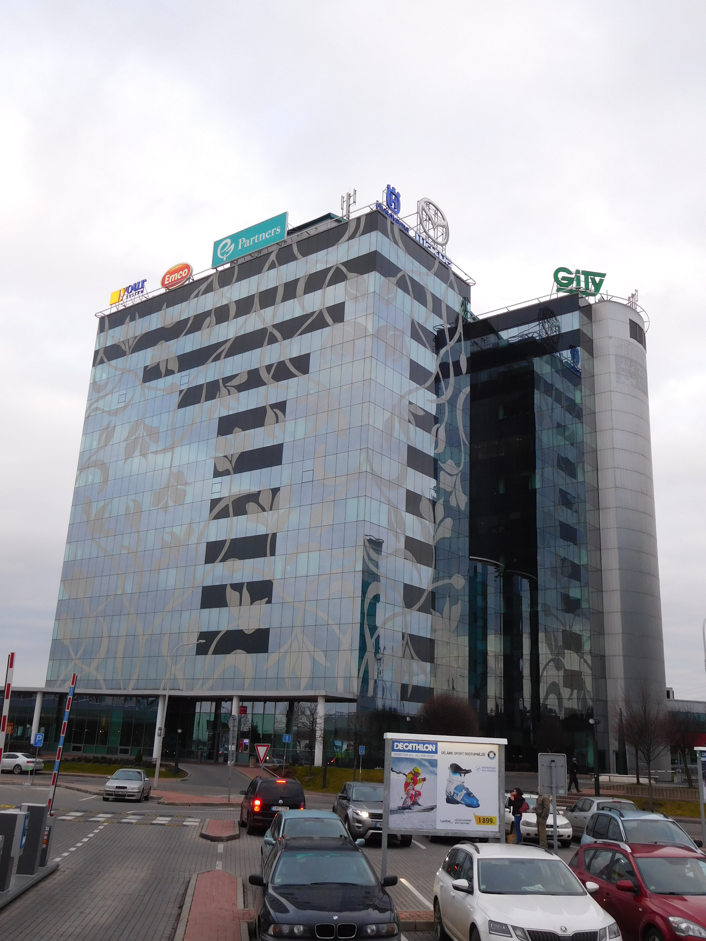 Praha - Chodov, Türkova 5b - Prague Gate